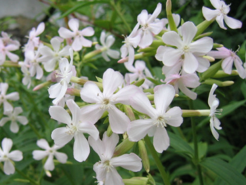 Sapnaria officinalis